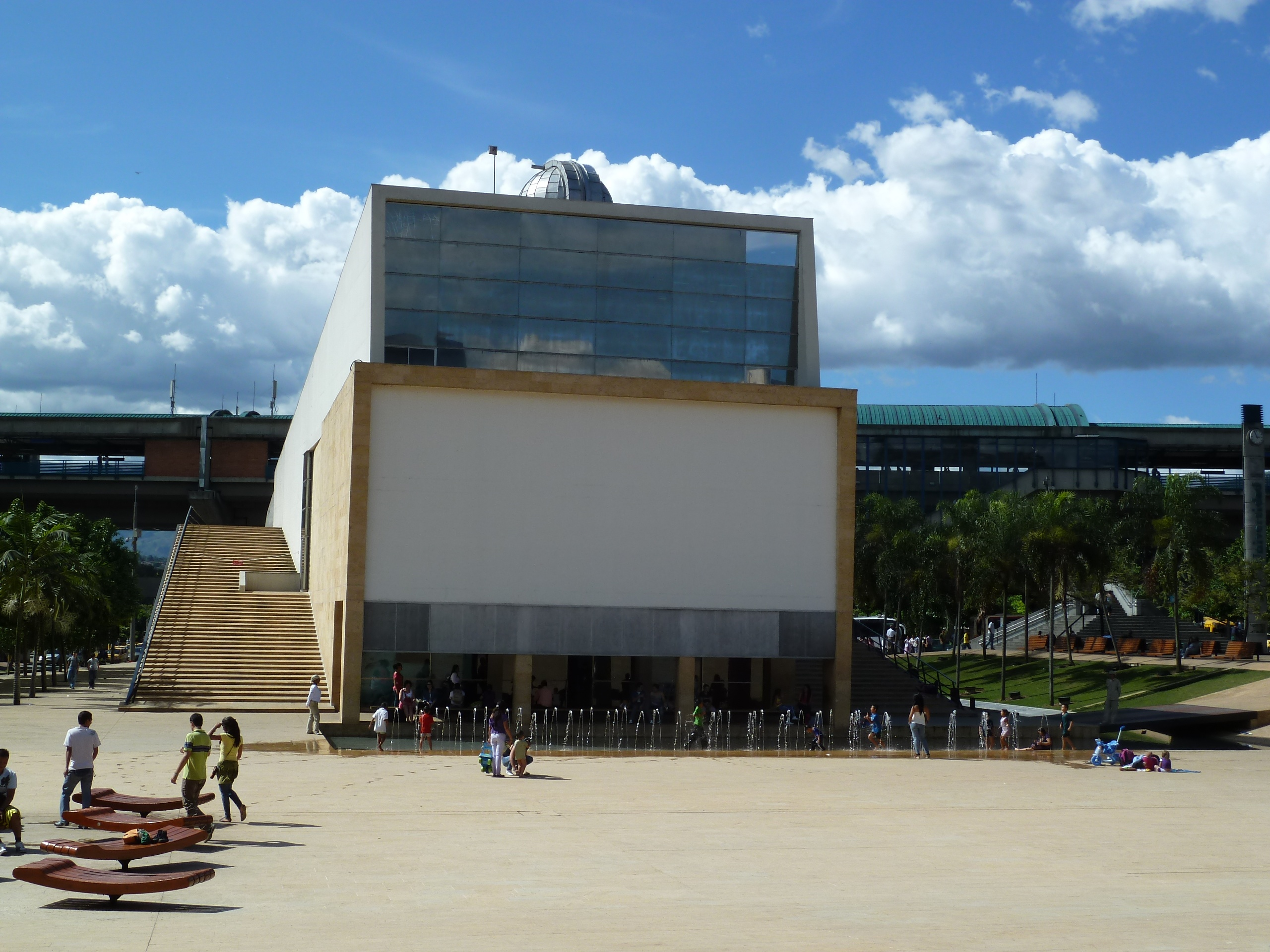 Planetario de Medellín, desde el Parque de los Deseos.